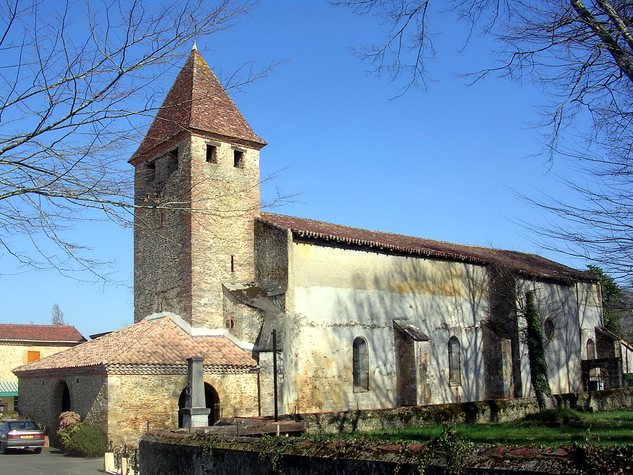 Eglise Saint-Pierre de Saint-Gein, dans le département français des Landes